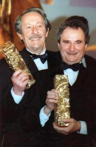 Jean Rochefort et Daniel Prévost à la cérémonie des Césars.